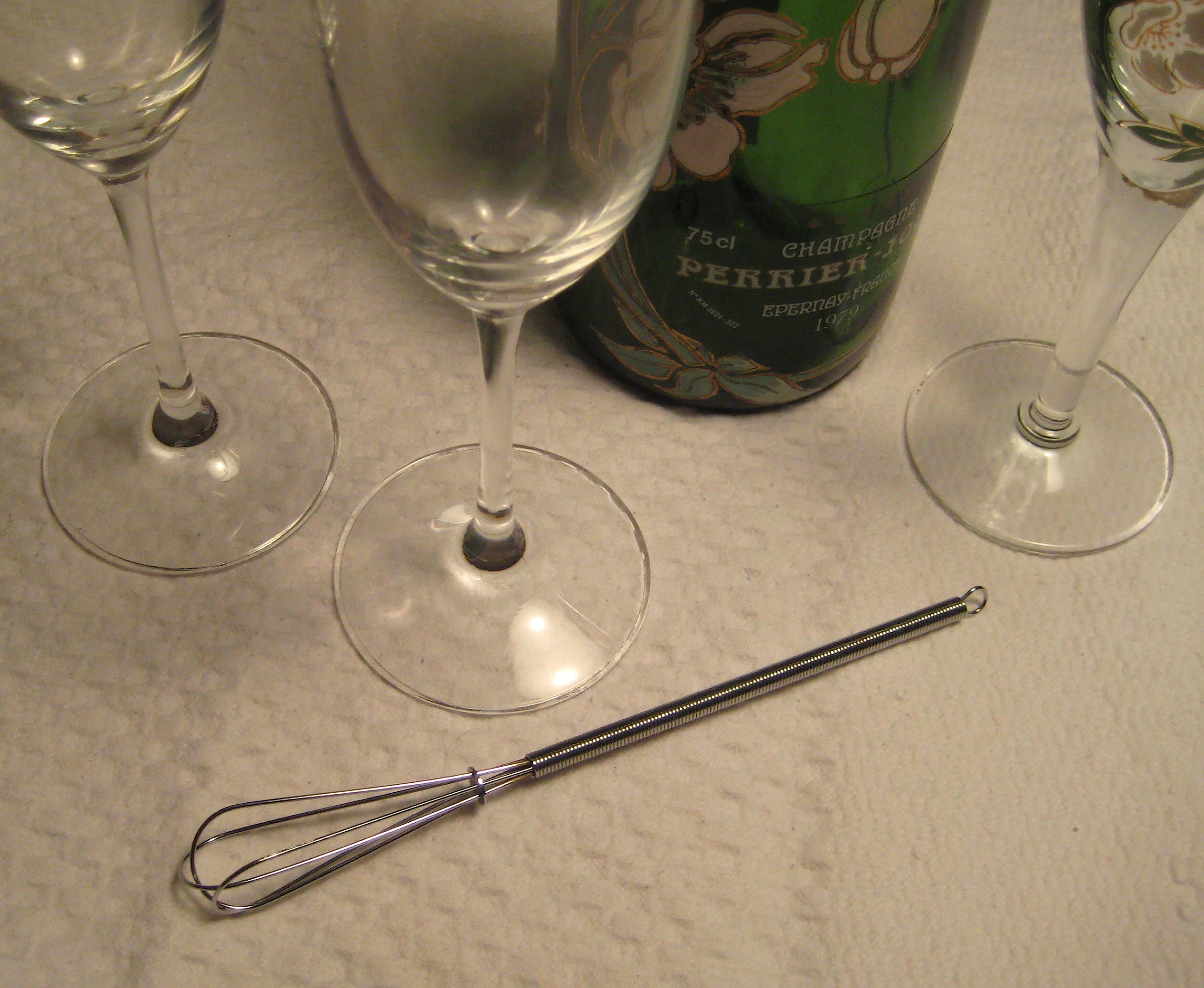 Ein Sektquirl aus Edelstahl, der ähnlich wie ein "Mini-Schneebesen" ausgebildet ist.